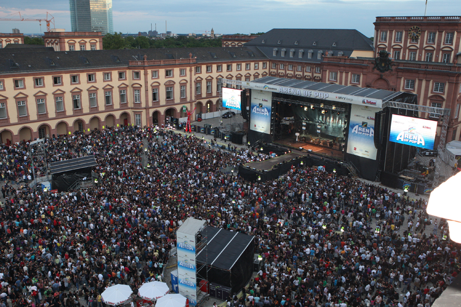 Arena of Pop. Bei Nutzung des Fotos bitte angeben: Foto: Dominik Rossbach / Stadtmarketing Mannheim GmbH